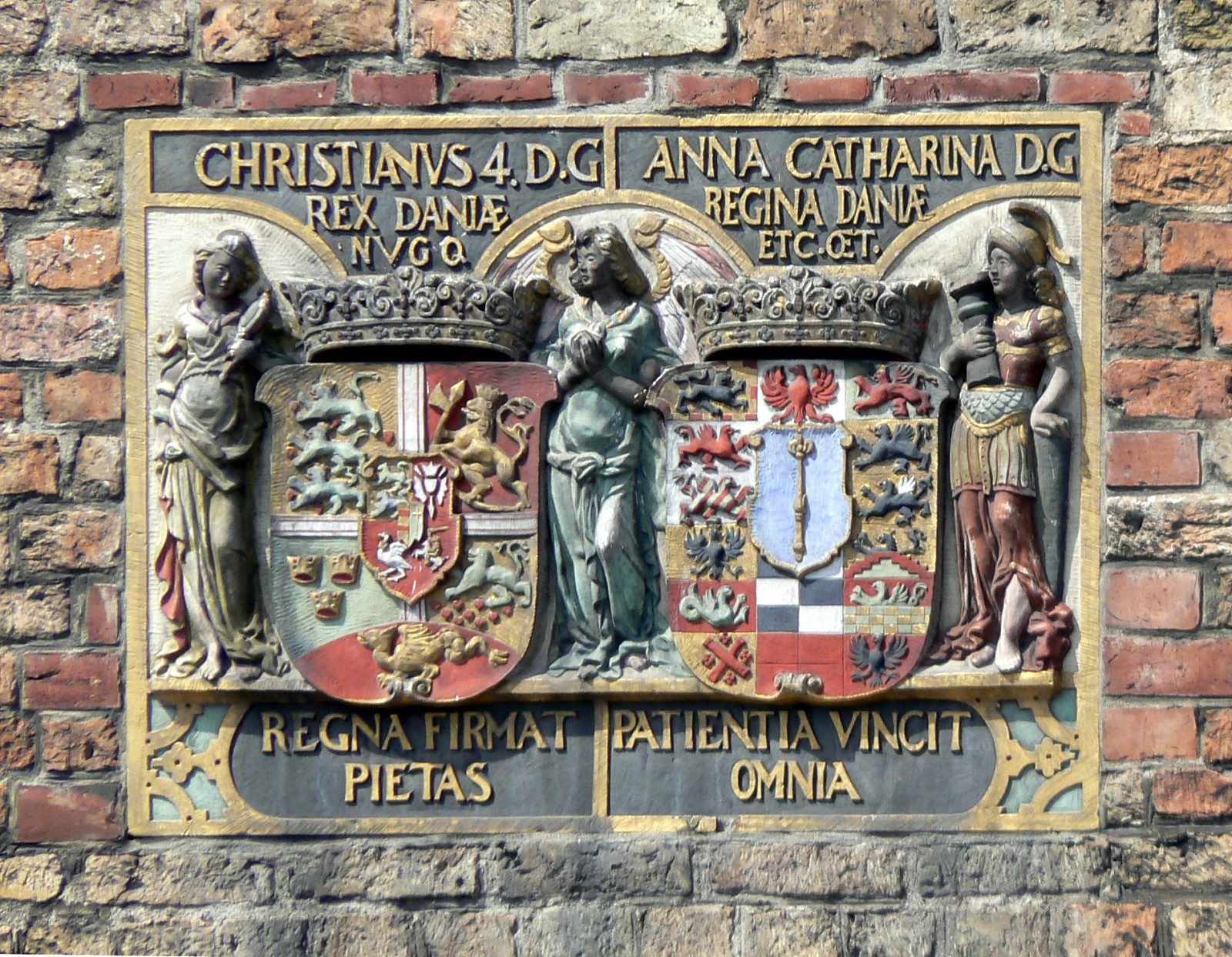 Våbenskjolde for kong Christian IV og hans første dronning Anna Katrine af Brandenborg. Tavlen findes på Kompagniporten i Flensborg, Sydslesvig.